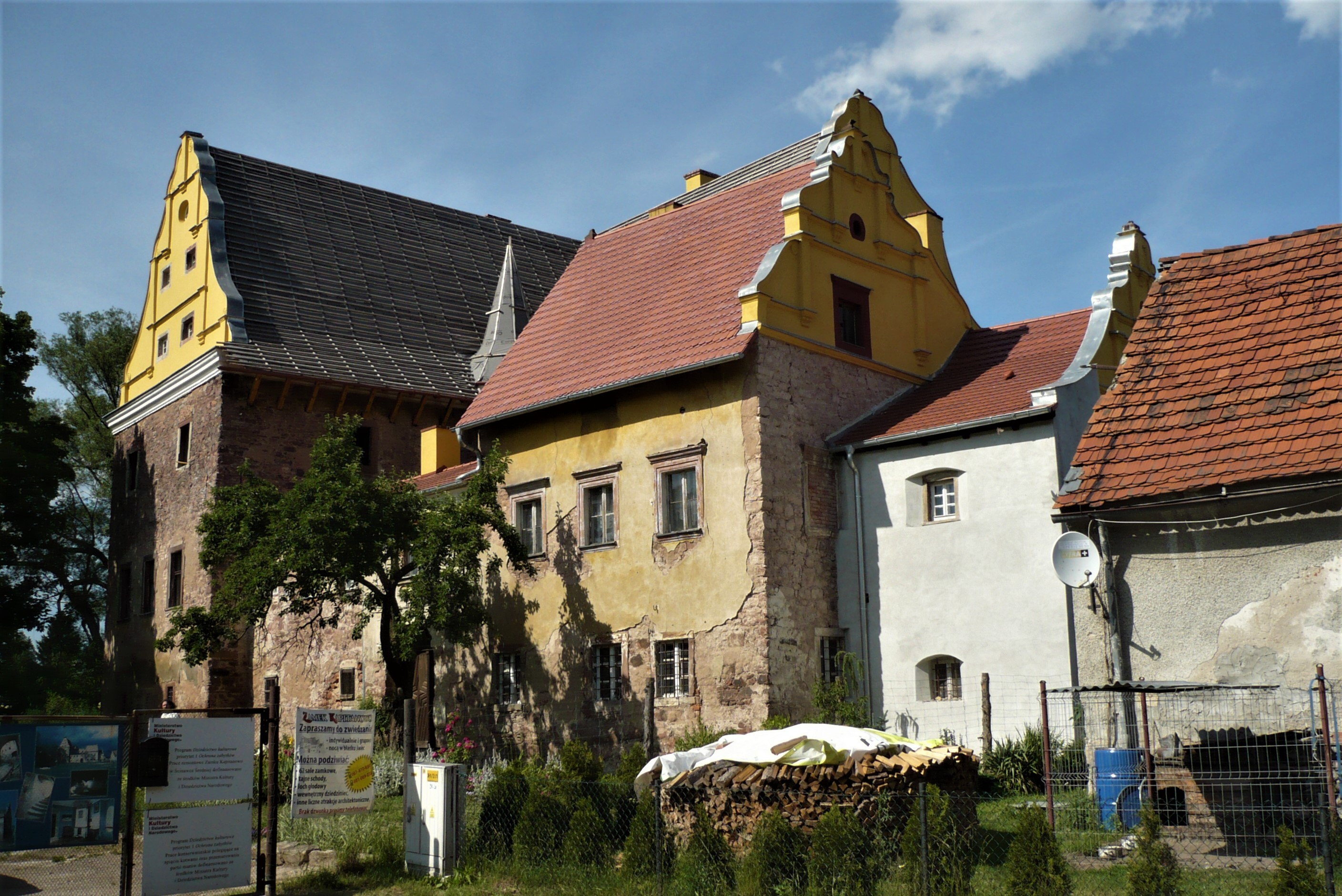 Zamek Kapitanowo